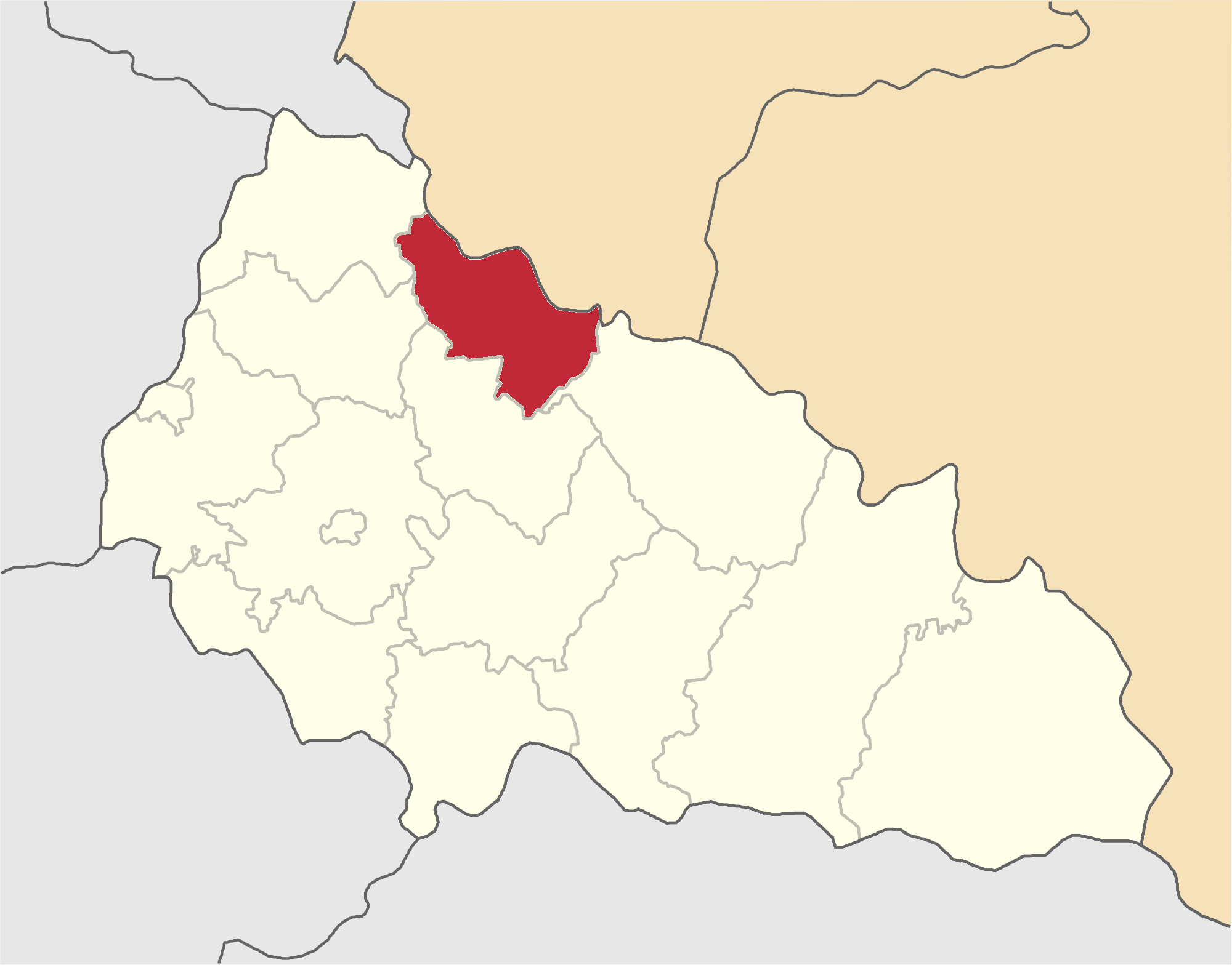 Volovetskyi-Raion map